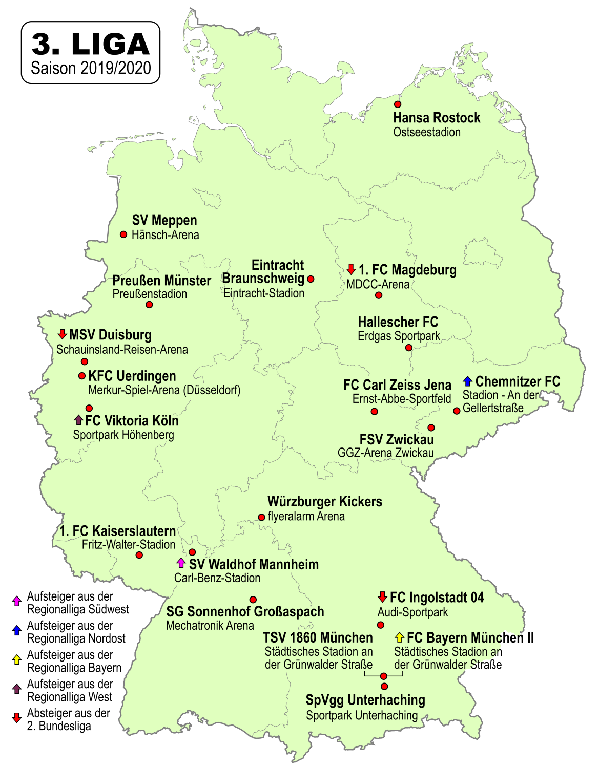 Karte der Vereine der 3. Fussball-Liga 2019/2020